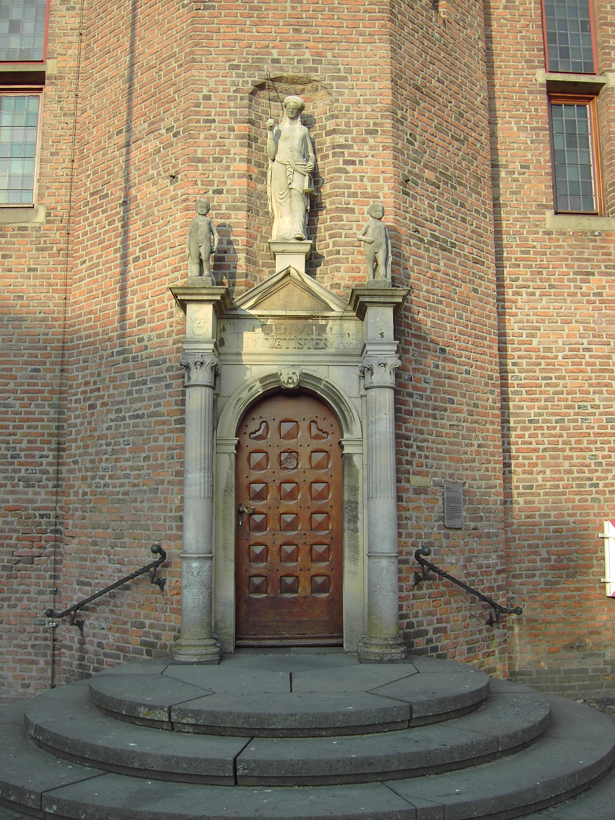 Rathaus Kalkar Renaissanceportal